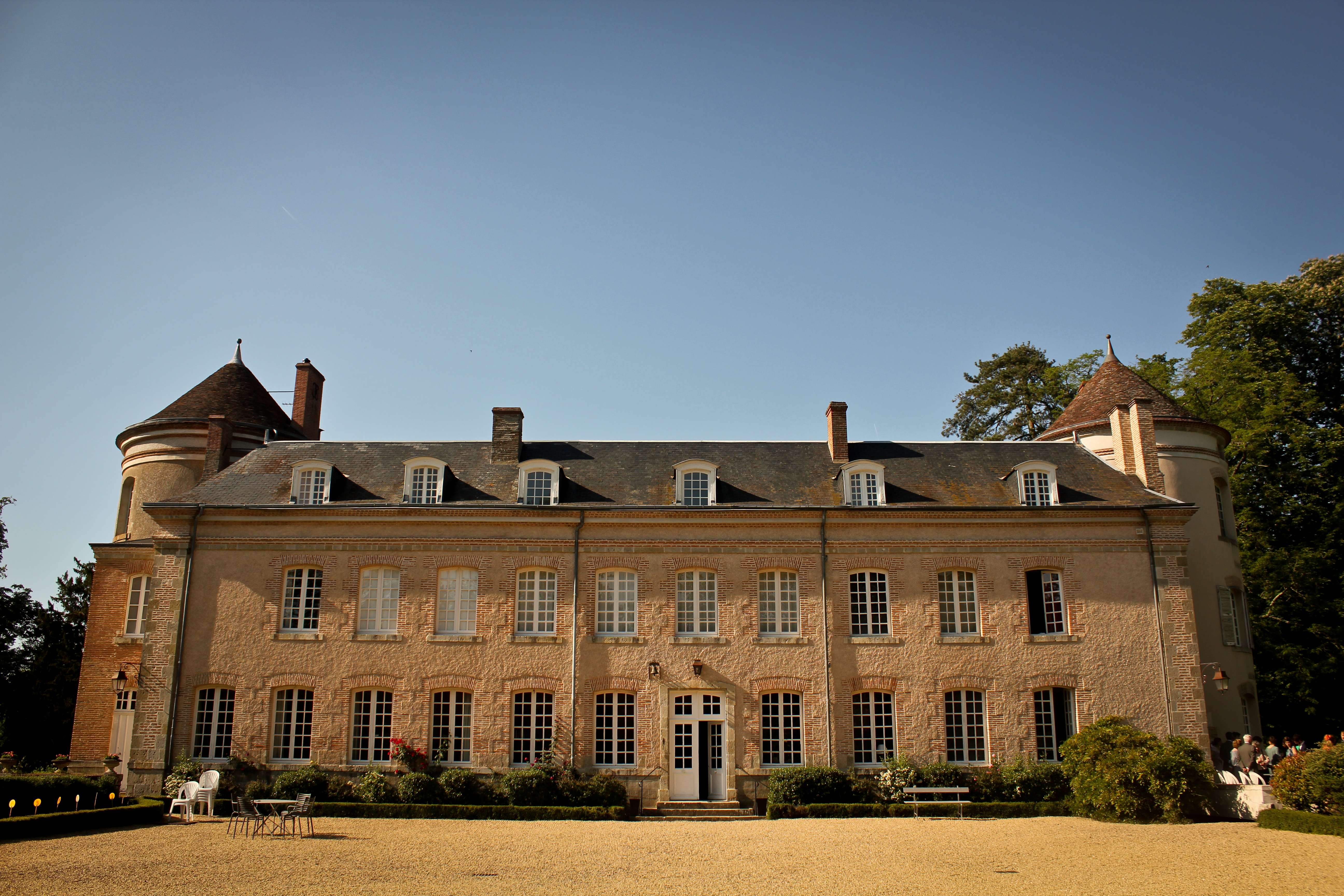 Château du Plessis-Loiret, Vitry-aux-Loges